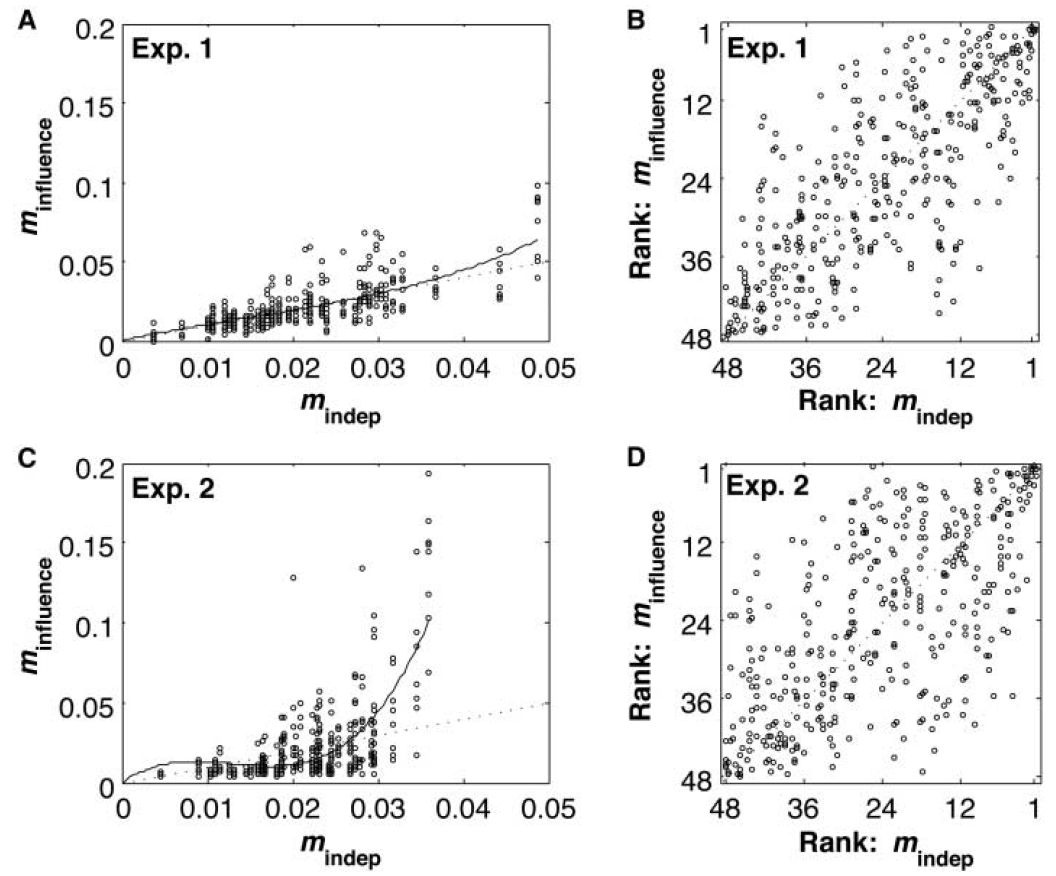 תיאור תוצאות הניסוי בעזרת מדד הצלחה m